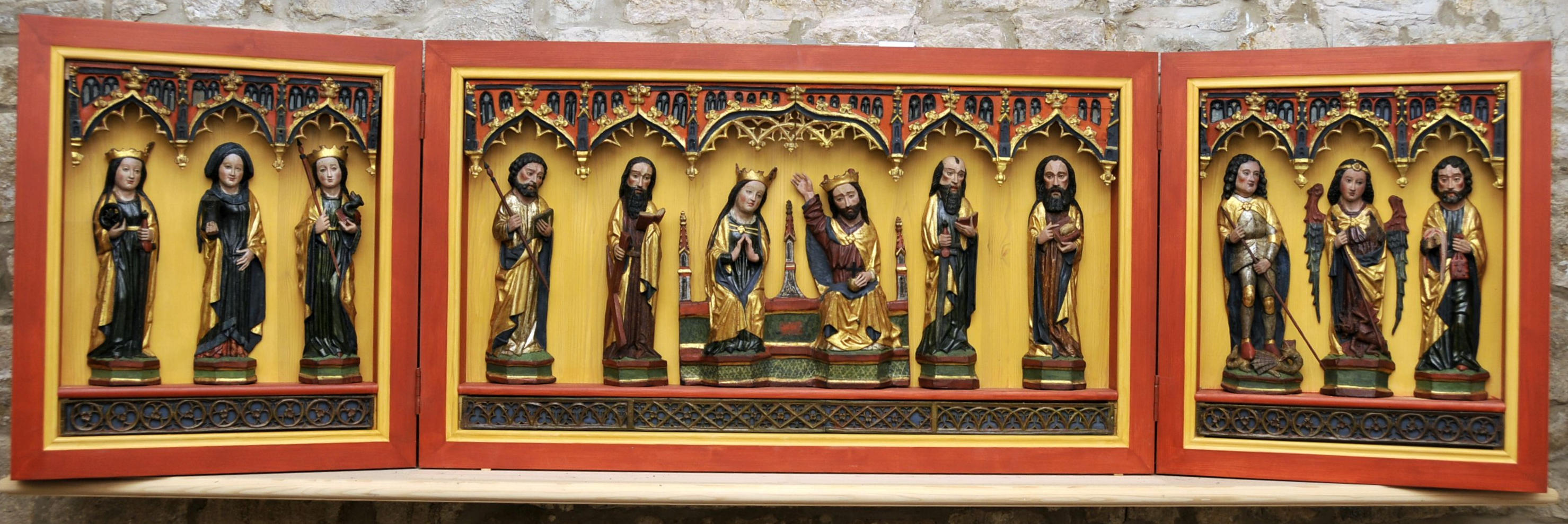 Ansicht eines Dreiflügelaltars in der Kirche von Grabsleben